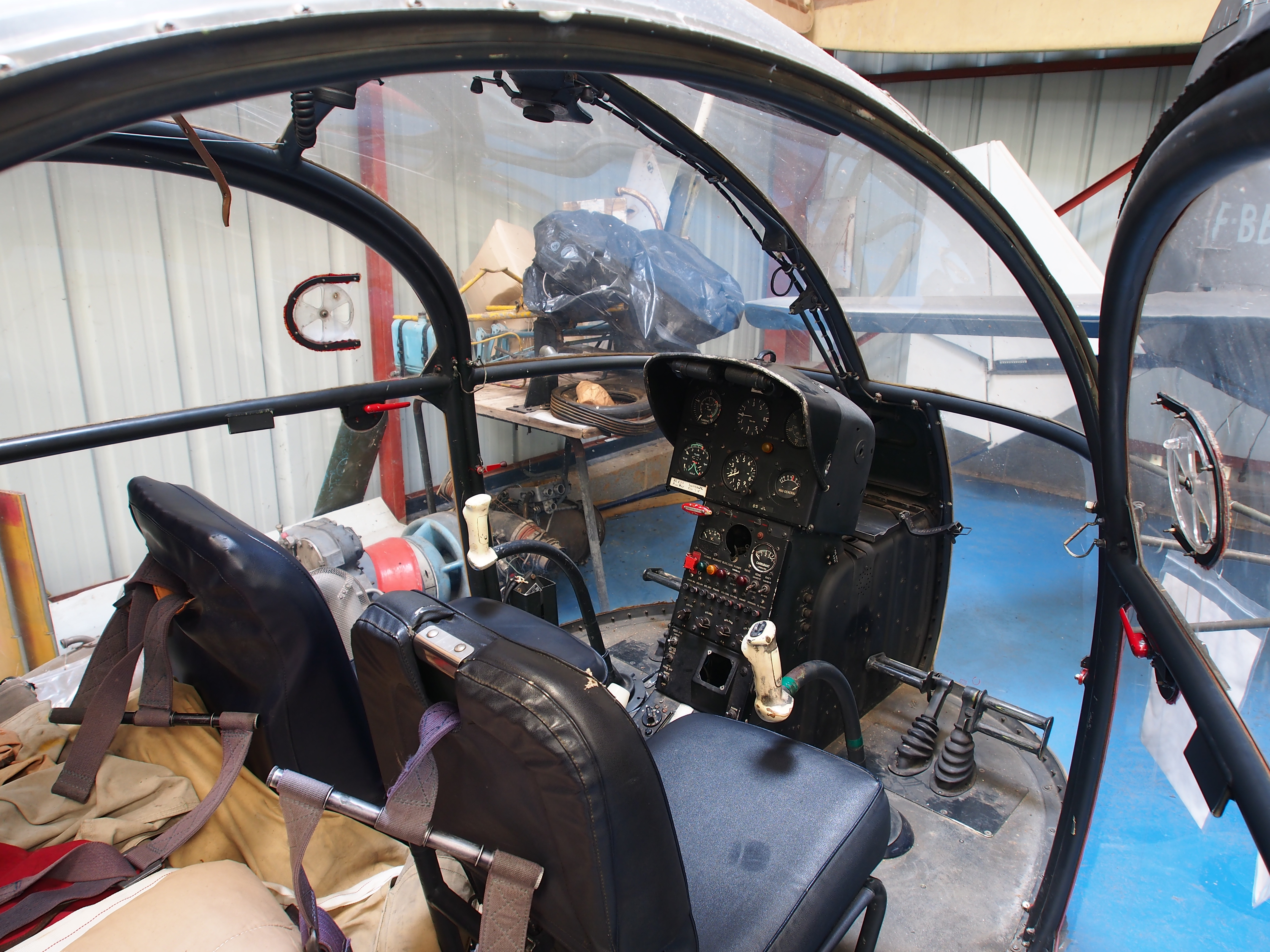 Photographed at the Musée de l'Epopée de l'Industrie et de l'Aéronautique, Albert, France.